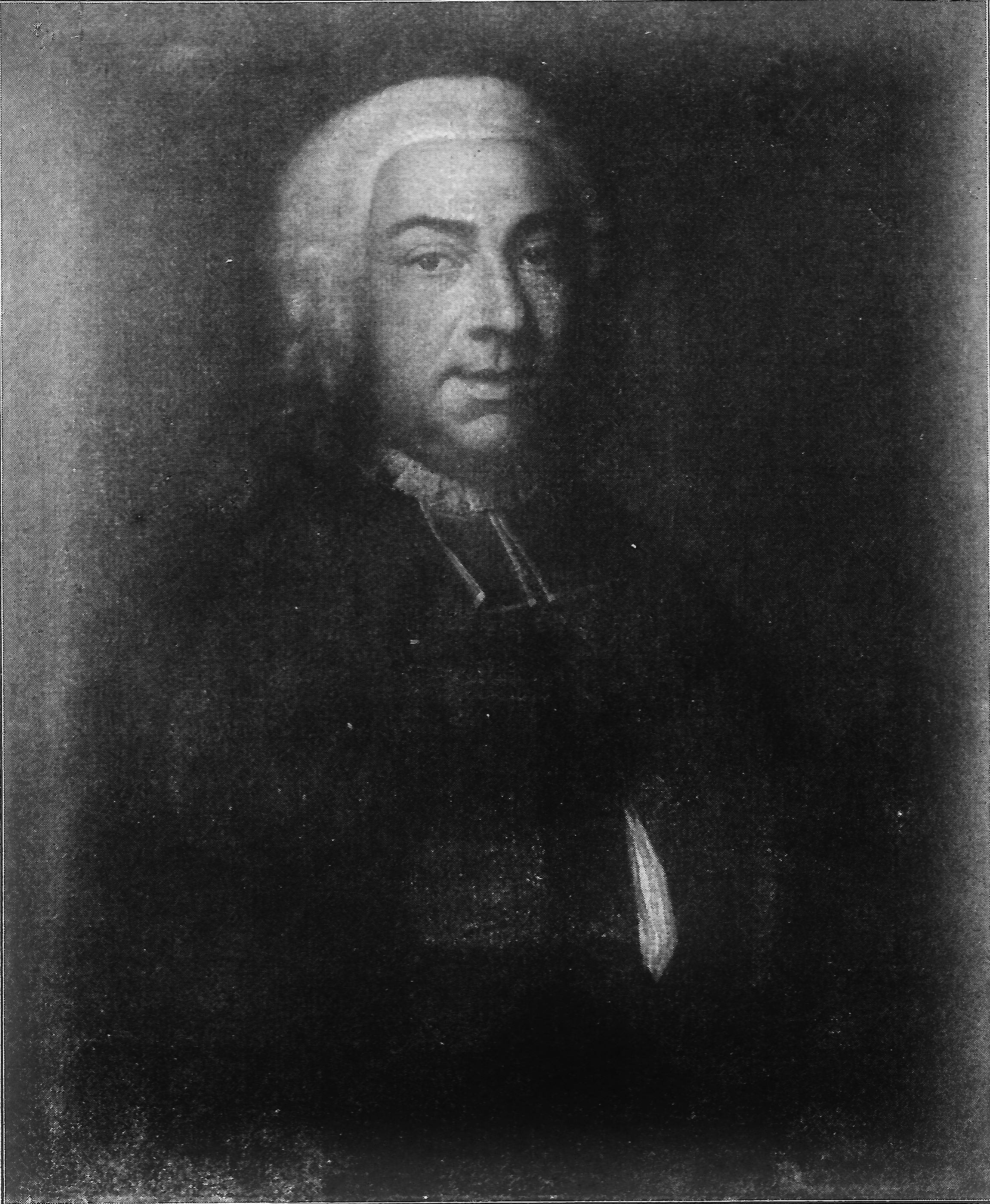 Prof. Burkhard David Mauchart, Gemälde in der Tübinger Professorengalerie